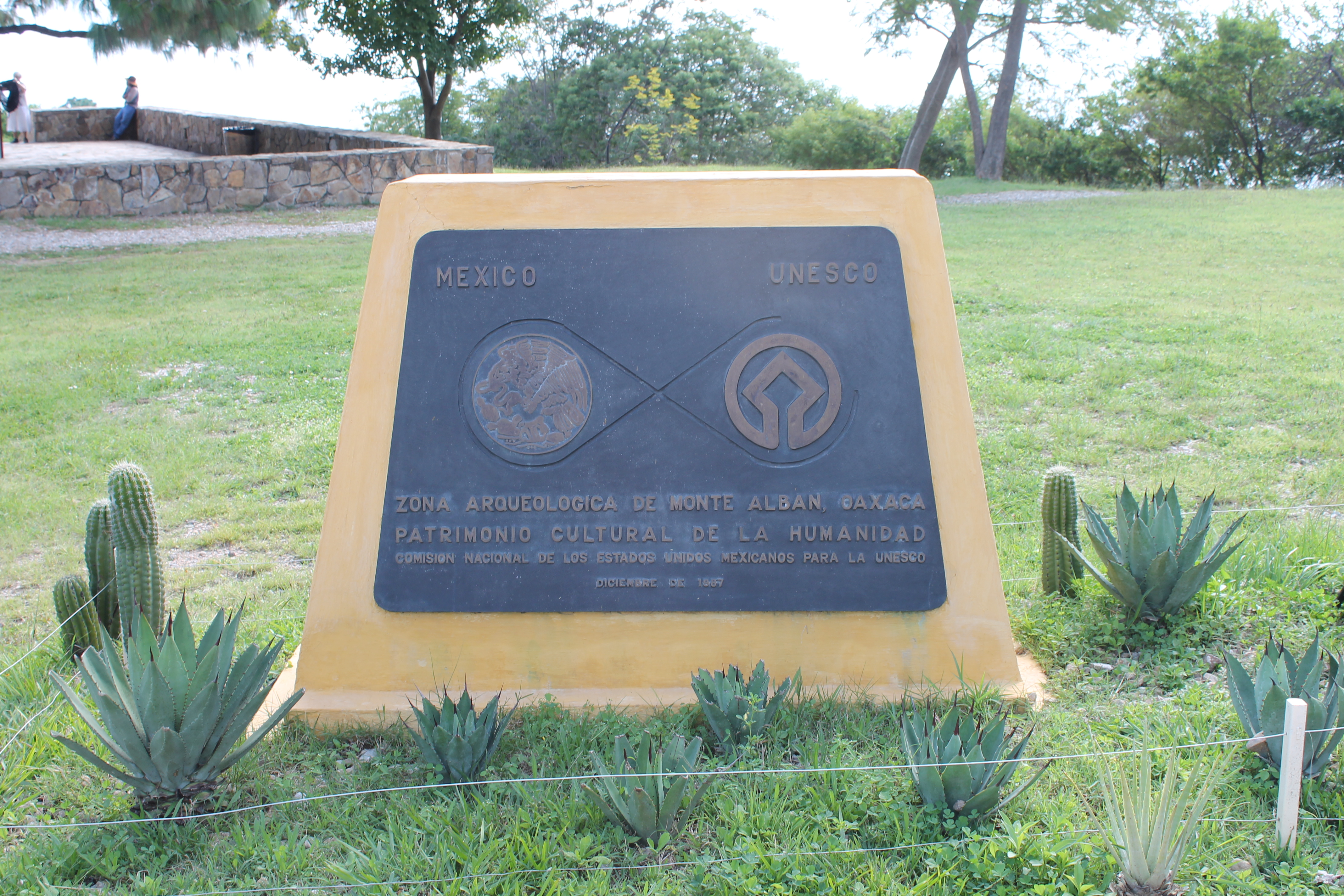 Placa de inscripción de la zona arqueológica de Monte Albán como Patrimonio Cultural de la Humanidad otorgada por la UNESCO en 1987.